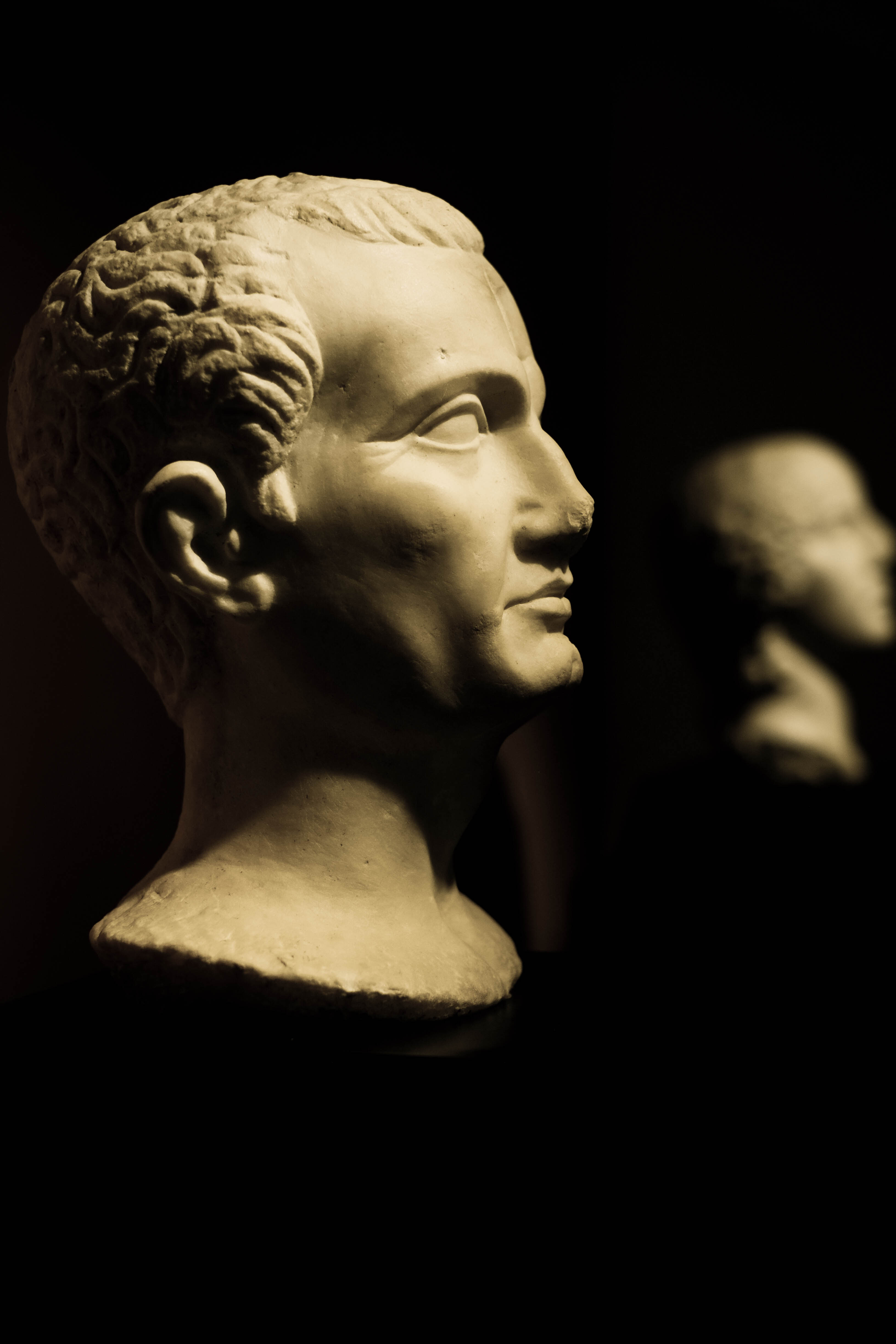 Museo Archeologico Statale di Urbisaglia - MIBAC This is a photo of a monument which is part of cultural heritage of Italy.